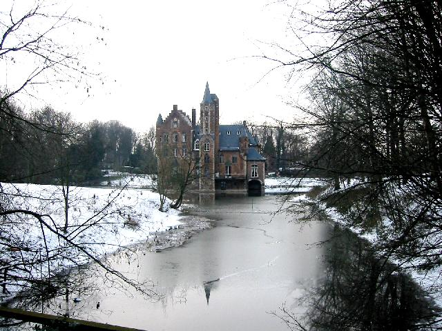 (eigen foto) De ligging van het kasteel van Wissekerke, Bazel (België), diep in de uitloper die het waterloopje de Daalstraatbeek heeft uitgesneden in de oever van de winterbedding van de Schelde. categorie:afbeelding kasteel